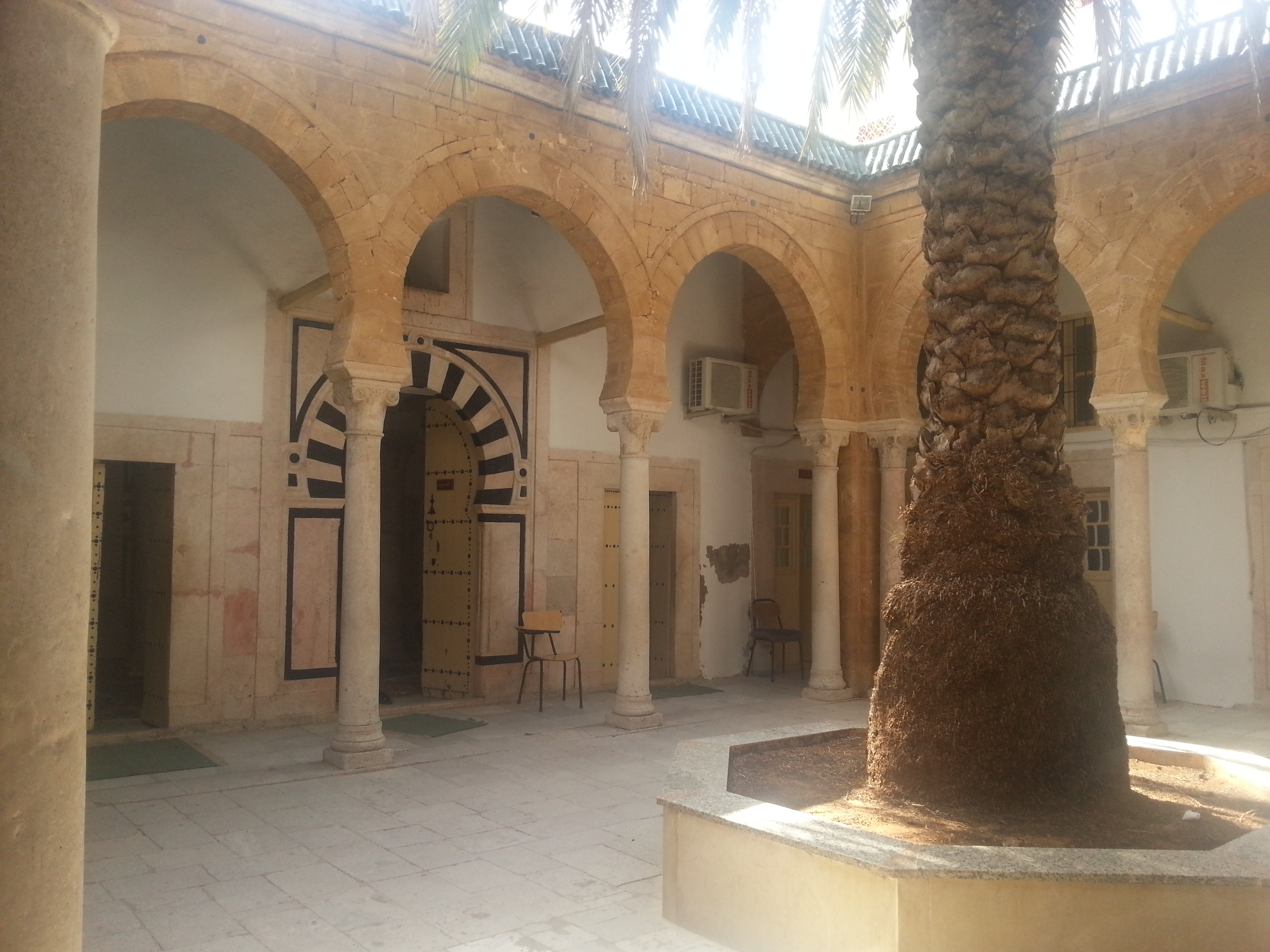 Medersa Ennakhla, Tunis